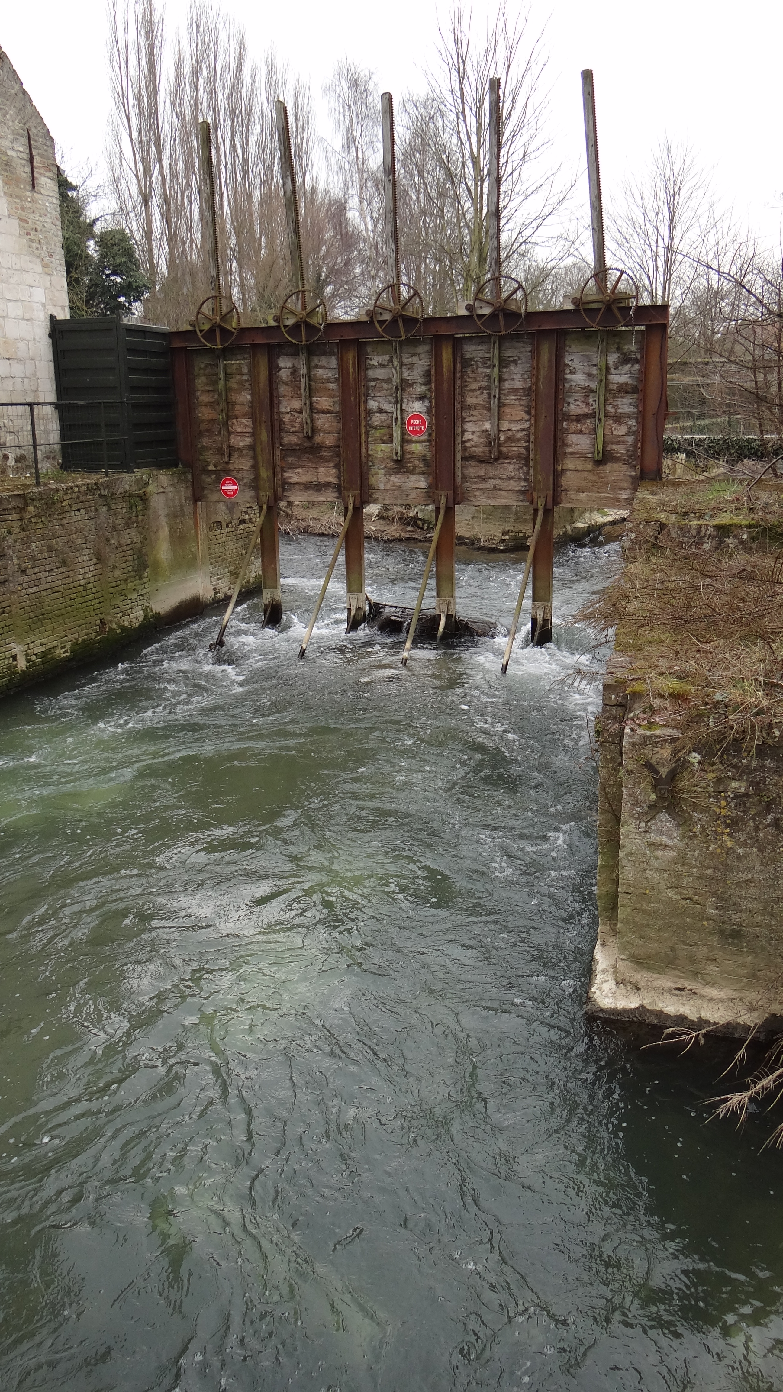 Blendecques AA